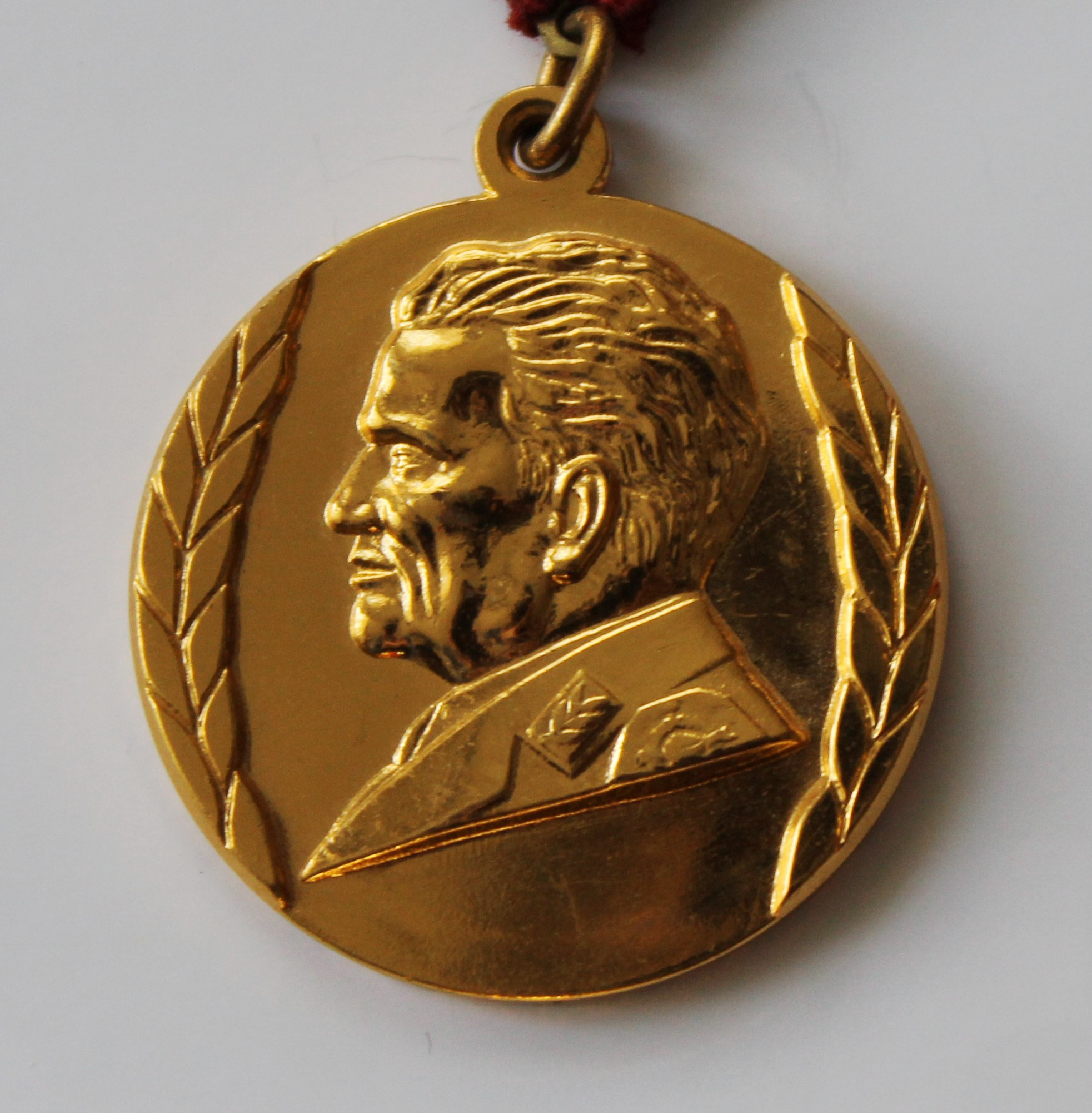 Спомен-медаља поводом четрдесетогодишњице ЈНА, 1981. година (предња страна)